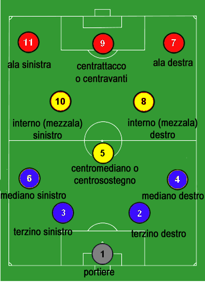 mia creazione